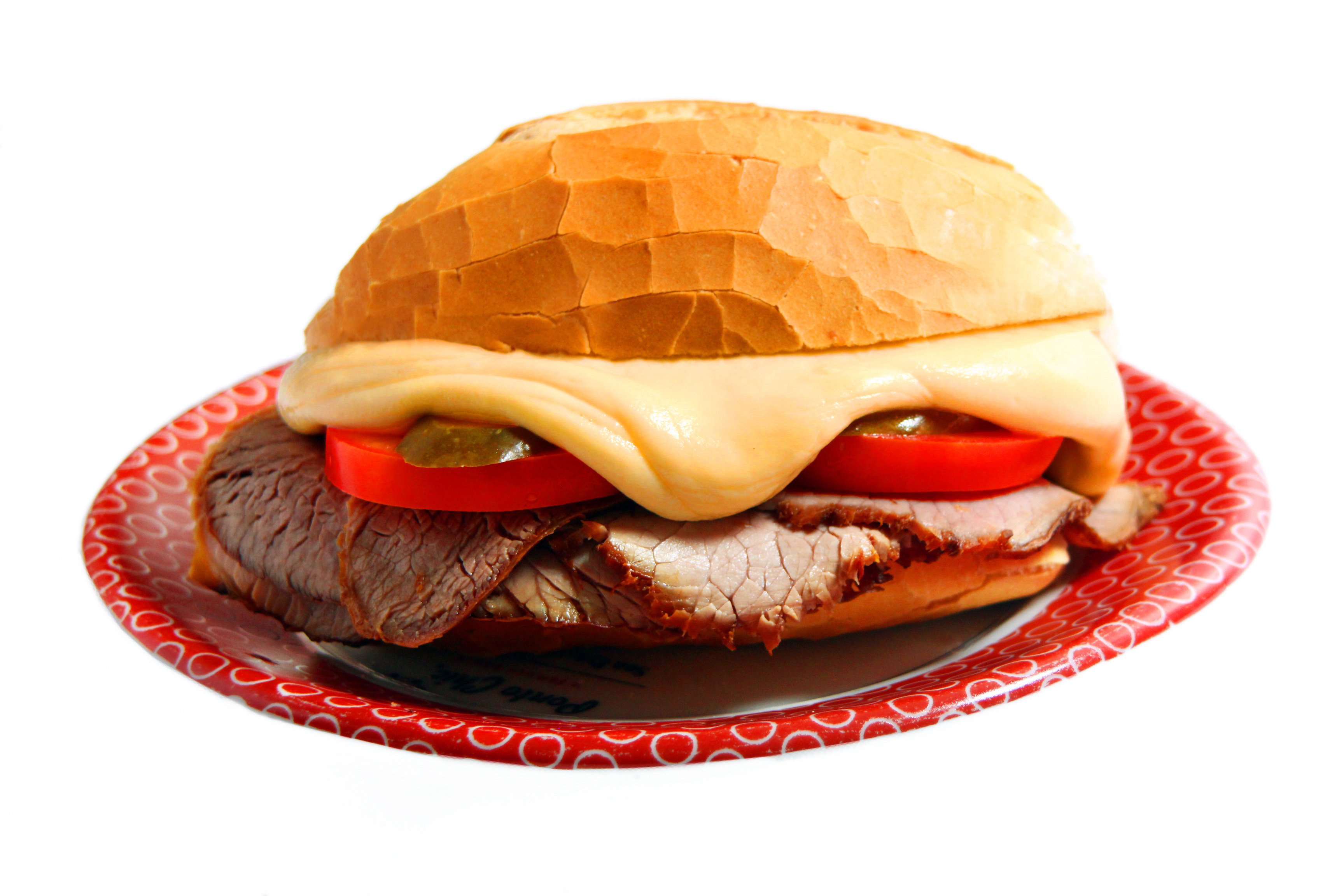 O Famoso Bauru